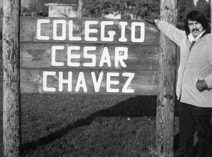 Esta es una fotografía de José Romero, fundador del Colegio César Chávez, en Oregon. En frente del edificio principal, que es la que plantea con el signo principal colegio.